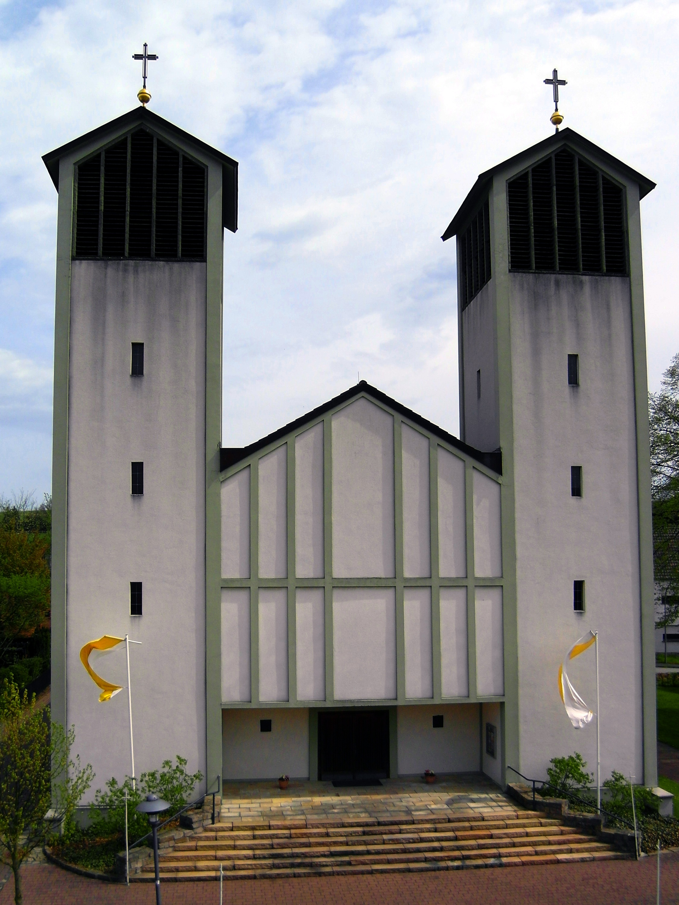 Dieses Foto zeigt die Westfassade der St. Johannes Nepomuk Kirche in Bökendorf (Brakel).